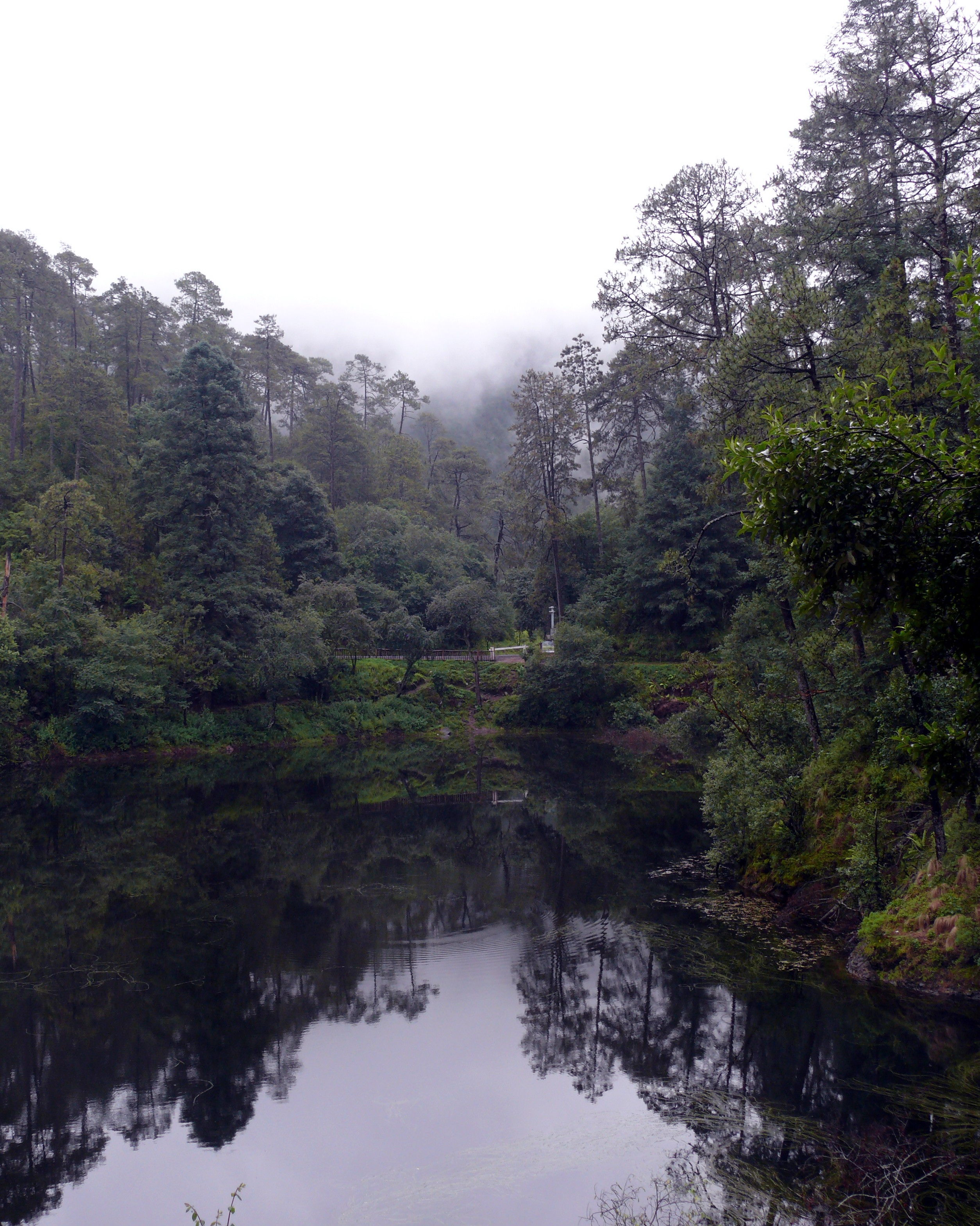 La laguna de Zempoala con neblina